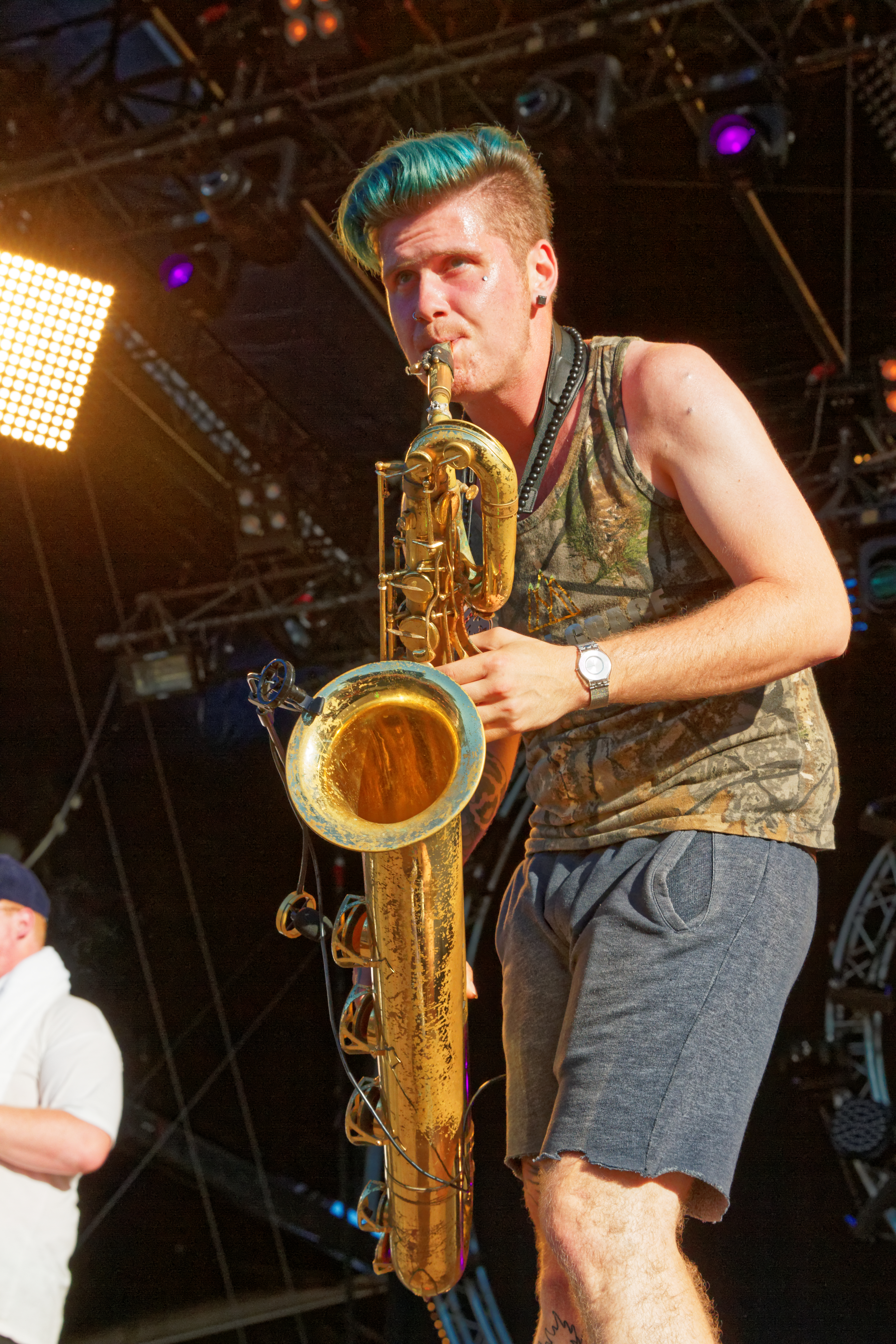 Too Many Zooz en concert lors du festival des vieilles charrues 2016.